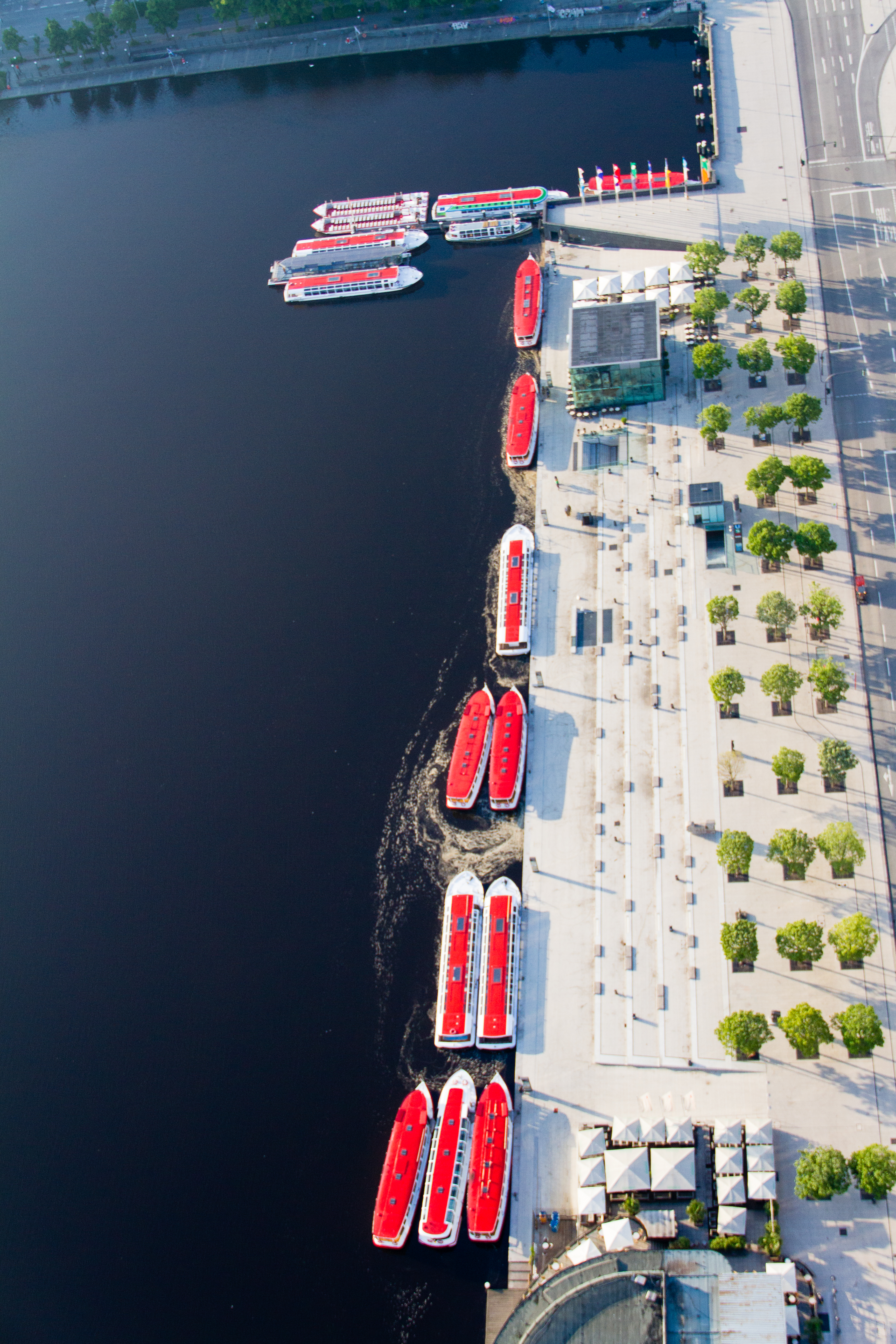 Jungfernstieg